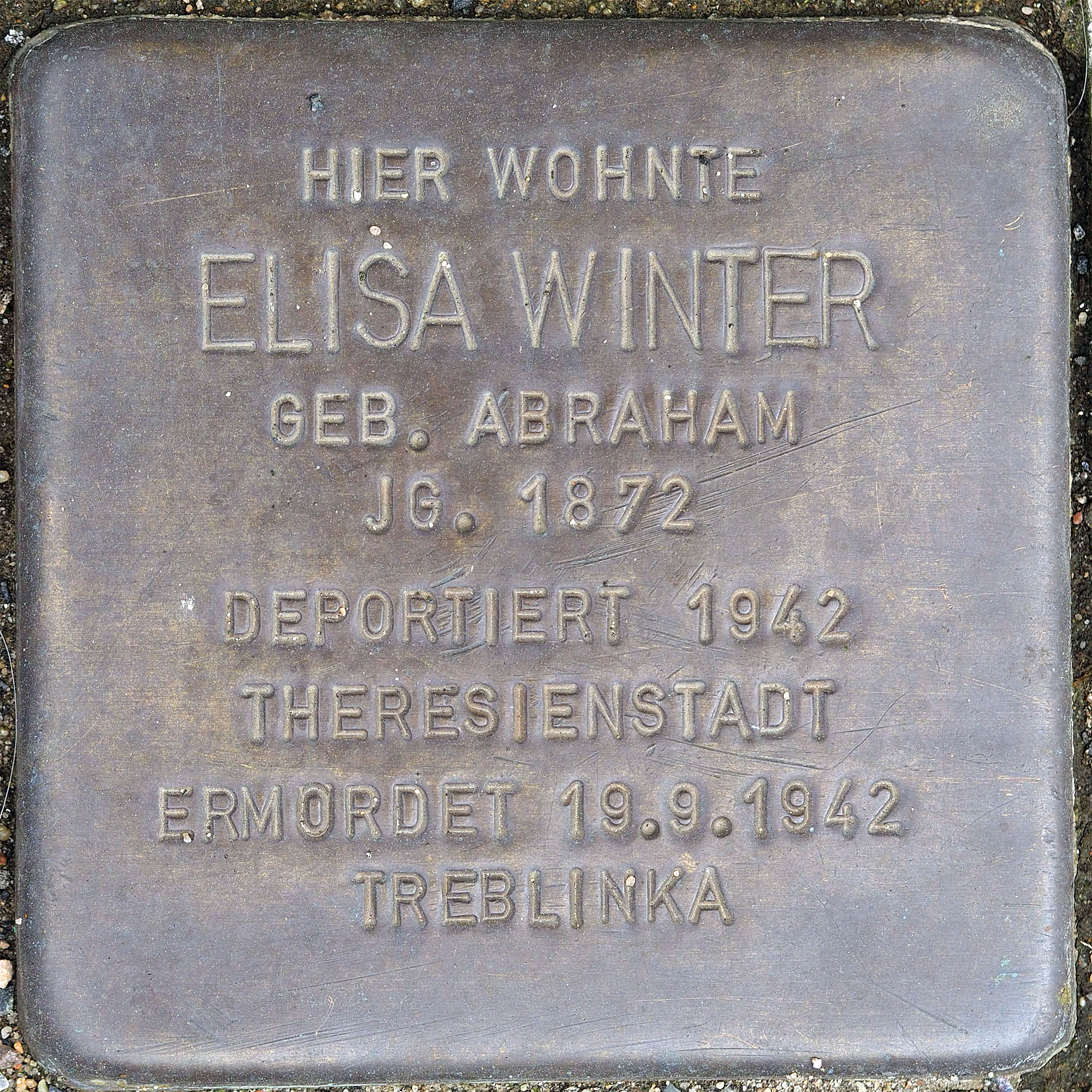 Stolpersteine Korschenbroich: Winter, Elisa